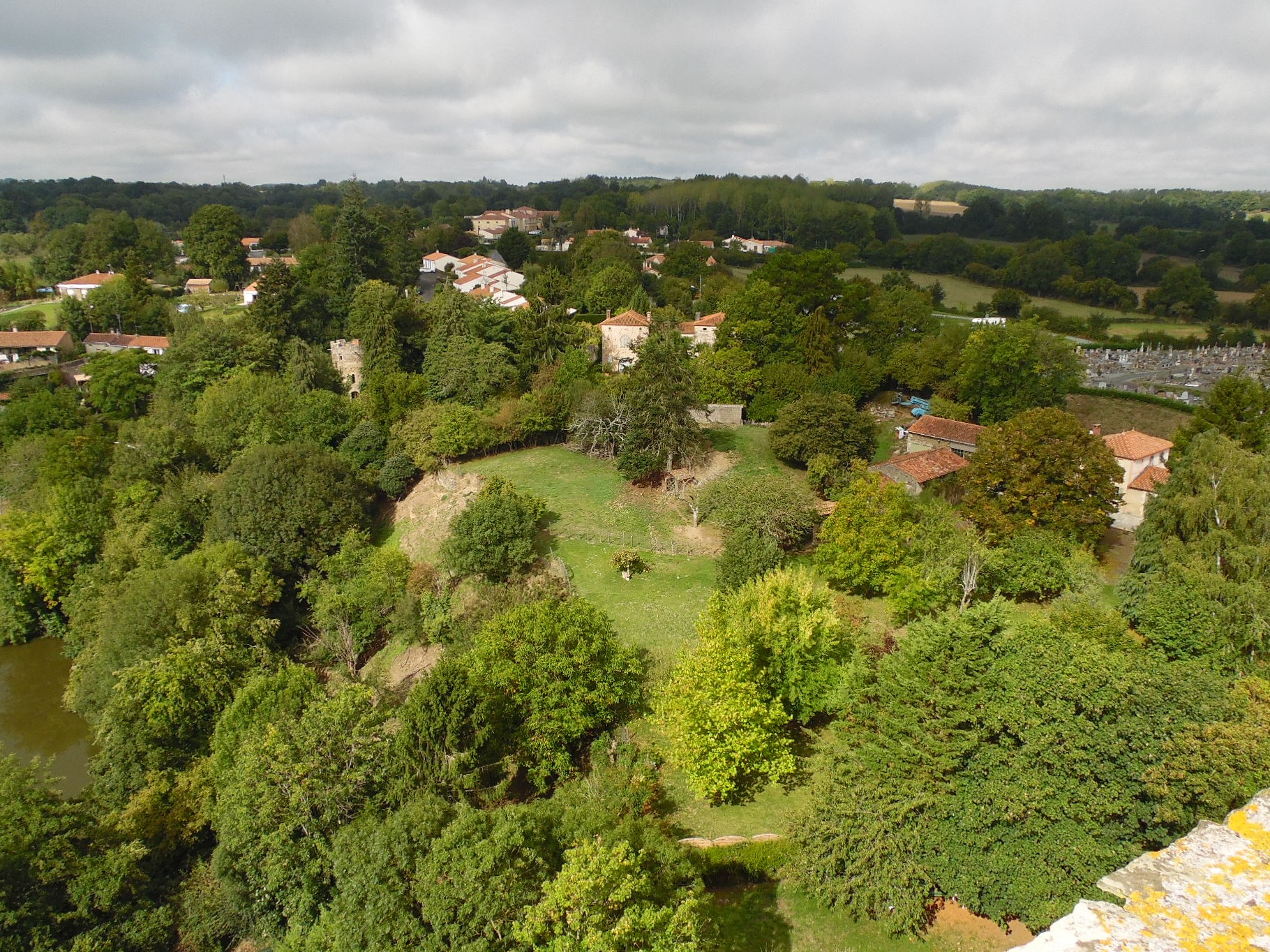 Ancienne motte castrale de Vouvant fortifiée au XVème siècle (4 tours encore présente actuellement), vue du haut de la Tour Mélusine.